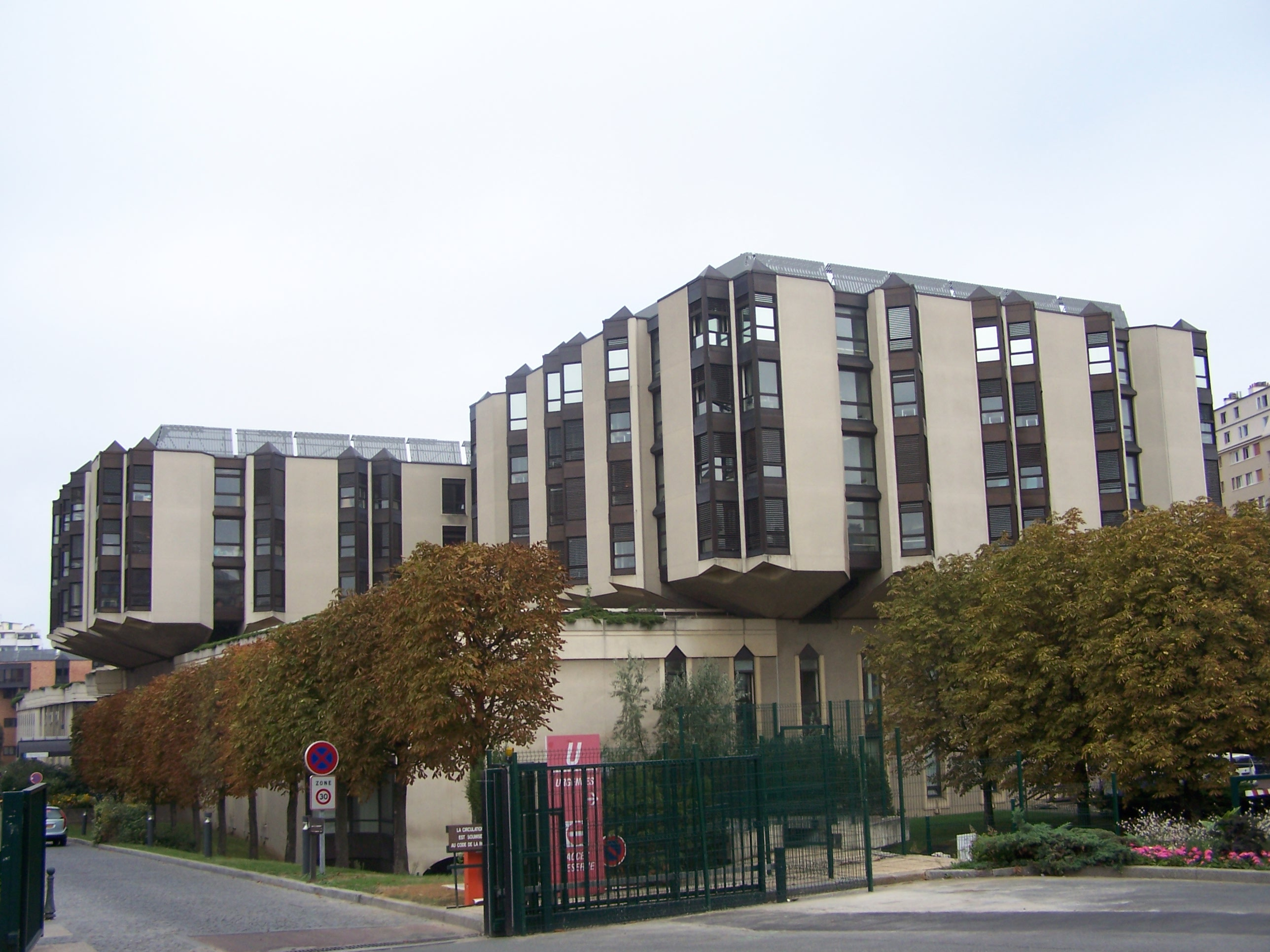 Hôpital Saint-Louis, "nouveau Saint-Louis" (Paris 11e, France)